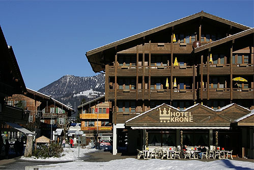 Kronenplatz in Lenk